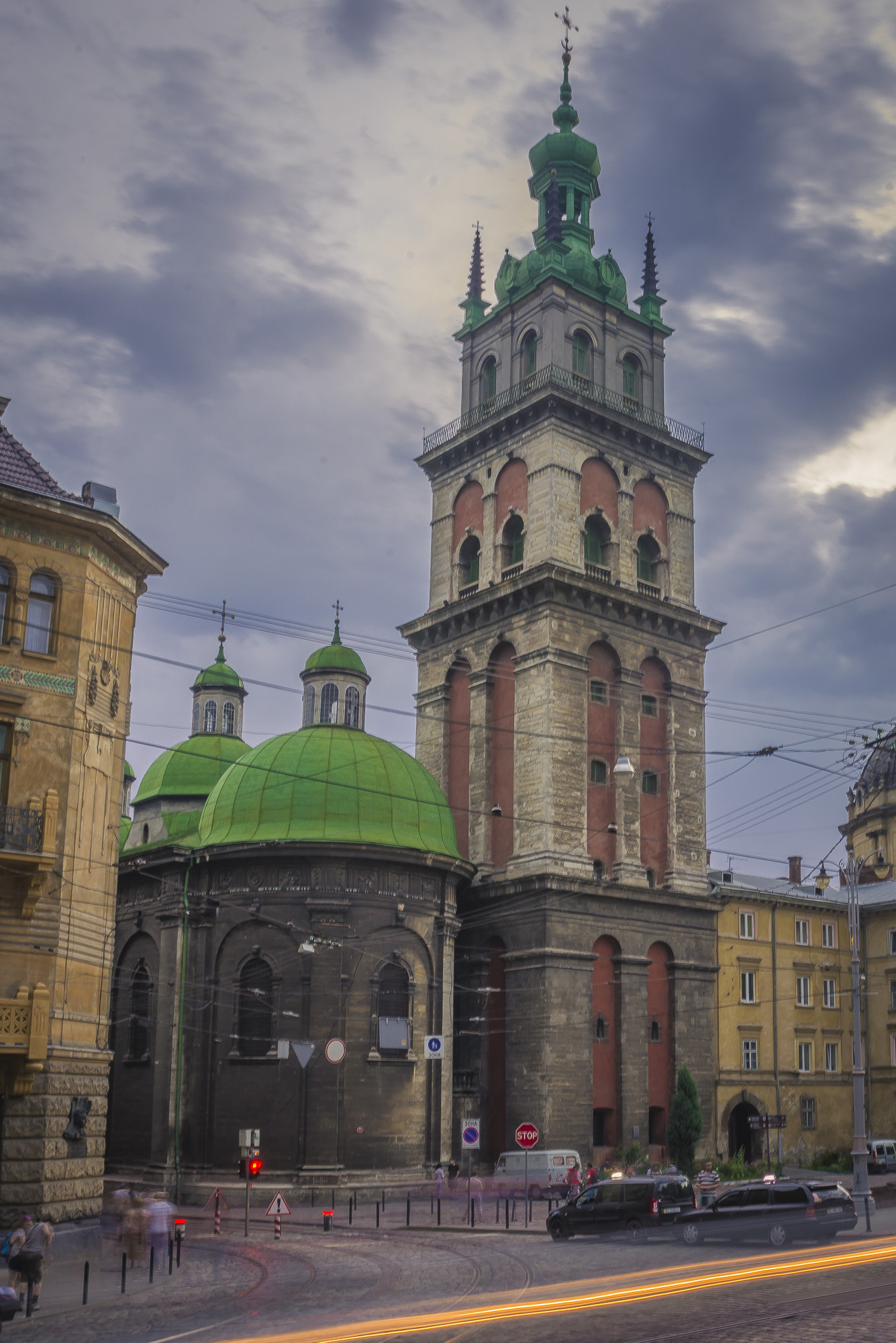 Ансамбль Успенської церкви, Львів, Руська